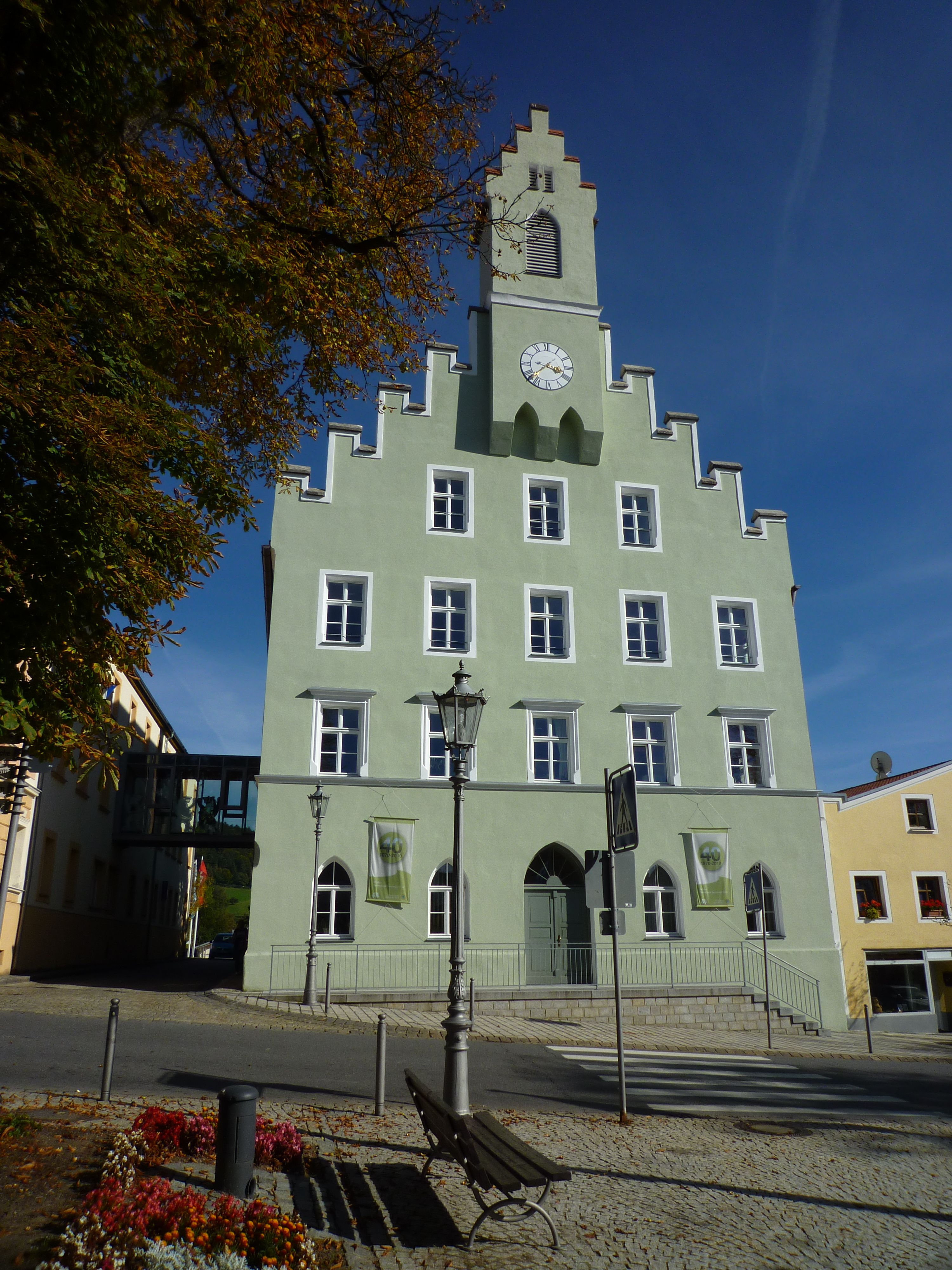 Grafenau - Ehemaliges Rathaus, jetzt Nationalparkverwaltung Bayerischer Wald